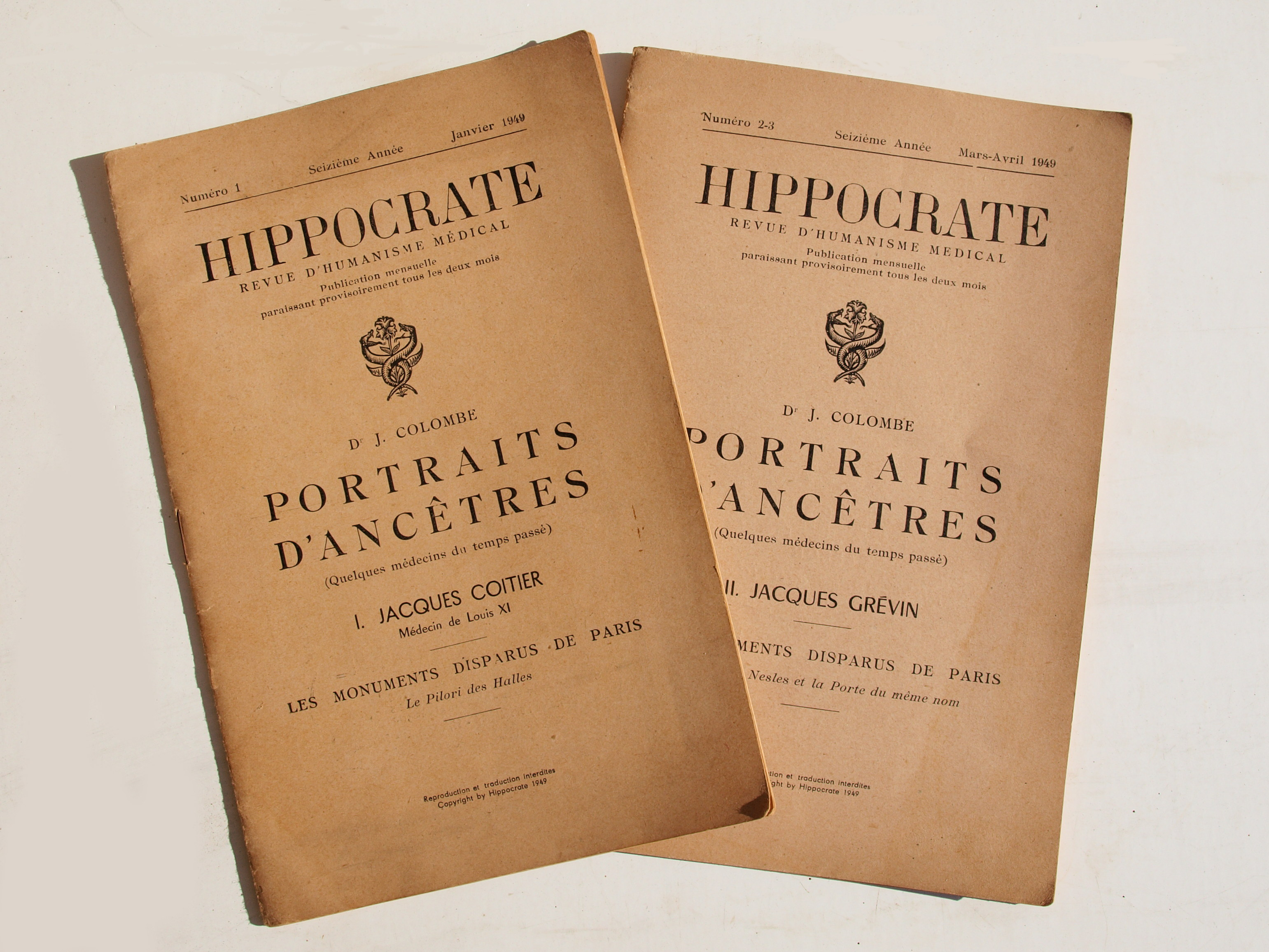 Photo de 2 exemplaires de la revue médicale Hippocrate, de l'année 1949